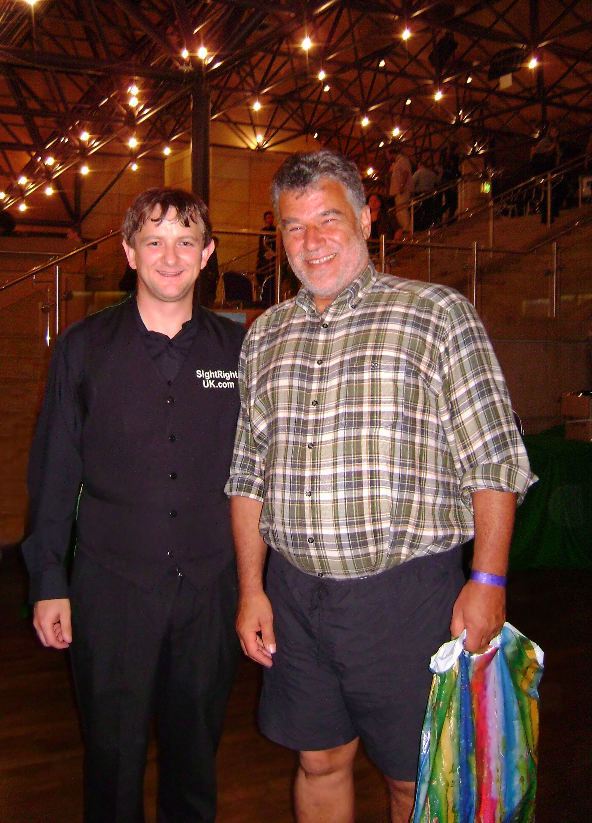 Snookerspieler Barry Pinches mit einem Fan bei den Paul Hunter Classic 2007